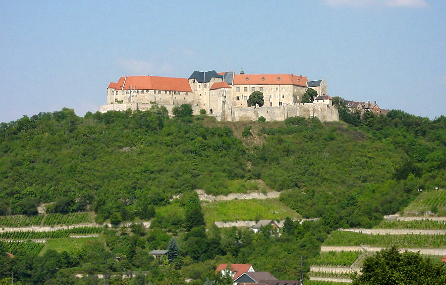 Neuenburg - Gesamtansicht